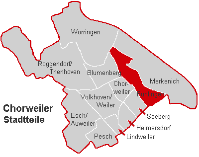 Lagekarte Fühlingen im Stadtbezirk Köln-Chorweiler